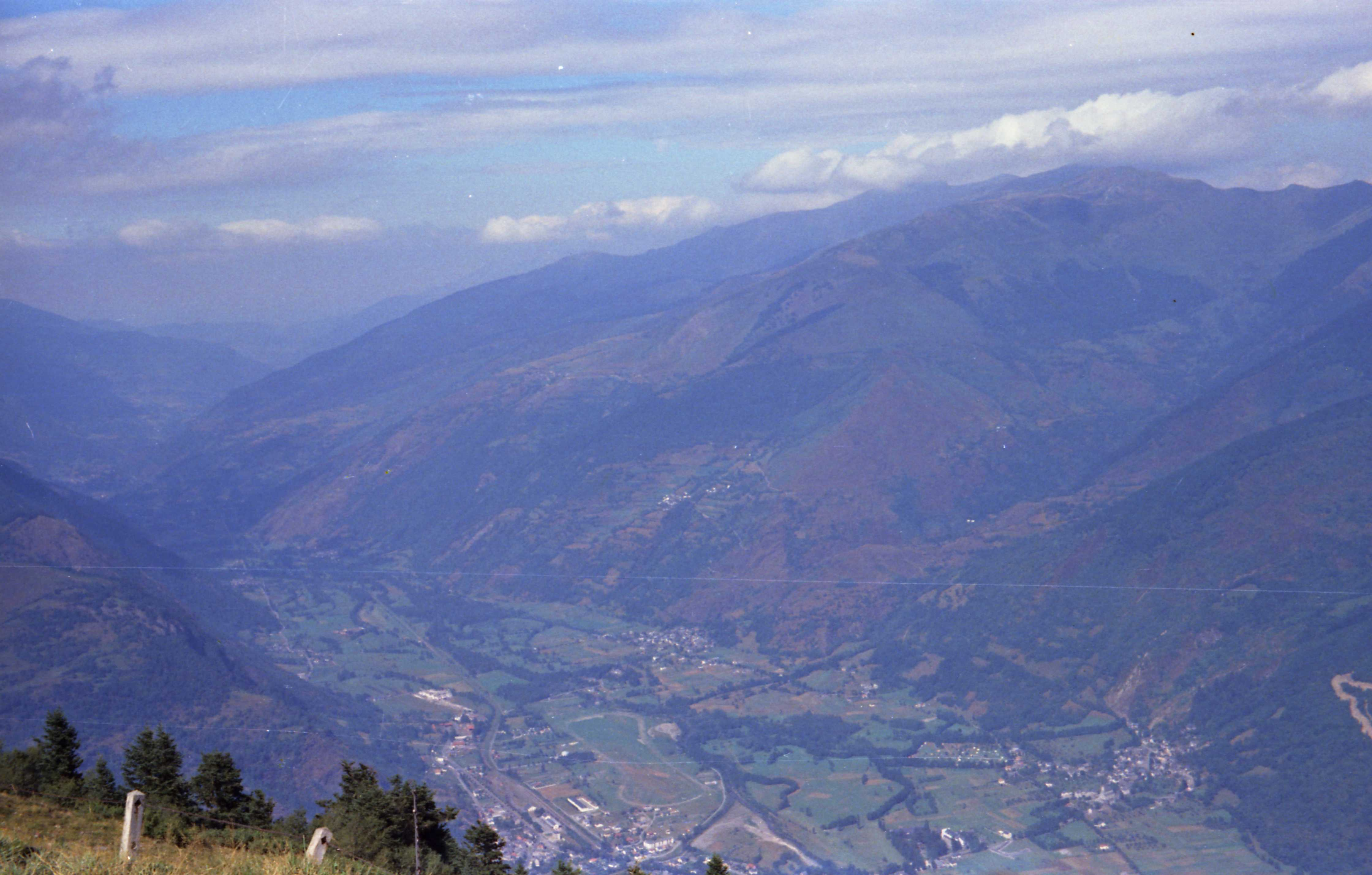 La Vallée de Luchon photographiée depuis la route menant à la station de sports d' hiver de Superbagnères. A gauche on peut distinguer Bagnère-de-Luchon, à droite Montauban-de-Luchon et plus loin encore à droite Juzet-de-Luchon. L'intérêt de cette photographie est de la rapprocher d'une autre image beaucoup plus récente de la Vallée afin de déterminer les modifications dans le paysage. Août 1965.